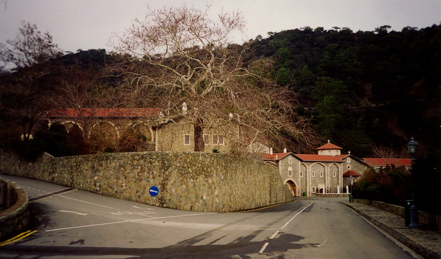 Monasterio de Kikkos. Frente. Troodos. Chipre. Imagen tomada por el cargador. Año 1998.